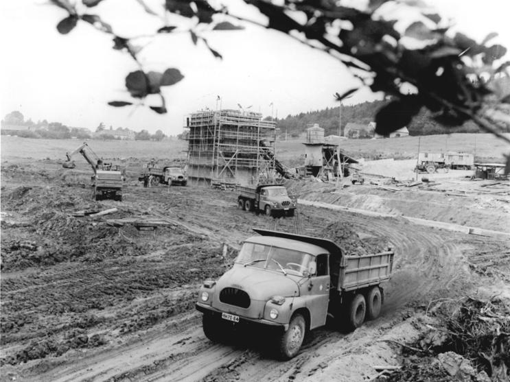 Rachlau, Bau eines Wasserspeichers ADN-ZB Häßler 9.7.75 Bez. Dresden: 240.000 m³ Beregnungswasser für 200 ha landwirtschaftliche Nutzfläche werden später in diesem Wasserspeicher gesammelt, den Werktätige des VEB Meliorationsbau Dresden gegenwärtig in Rachlau, Kreis Bautzen, errichten. Mit dem Bau von Be- und Entwässerungsanlagen, Betonwirtschaftswegen, Flußbefestigungen, Vorflutern und Landwirtschaftsbauten leisten die Meliorationstechniker dieses Betriebes einen wichtigen Beitrag zur Intensivierung der Agrarproduktion im Bezirk.